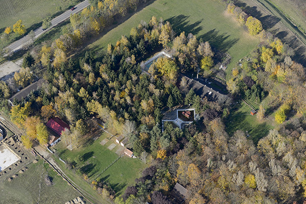 Mezőcsát a magasból